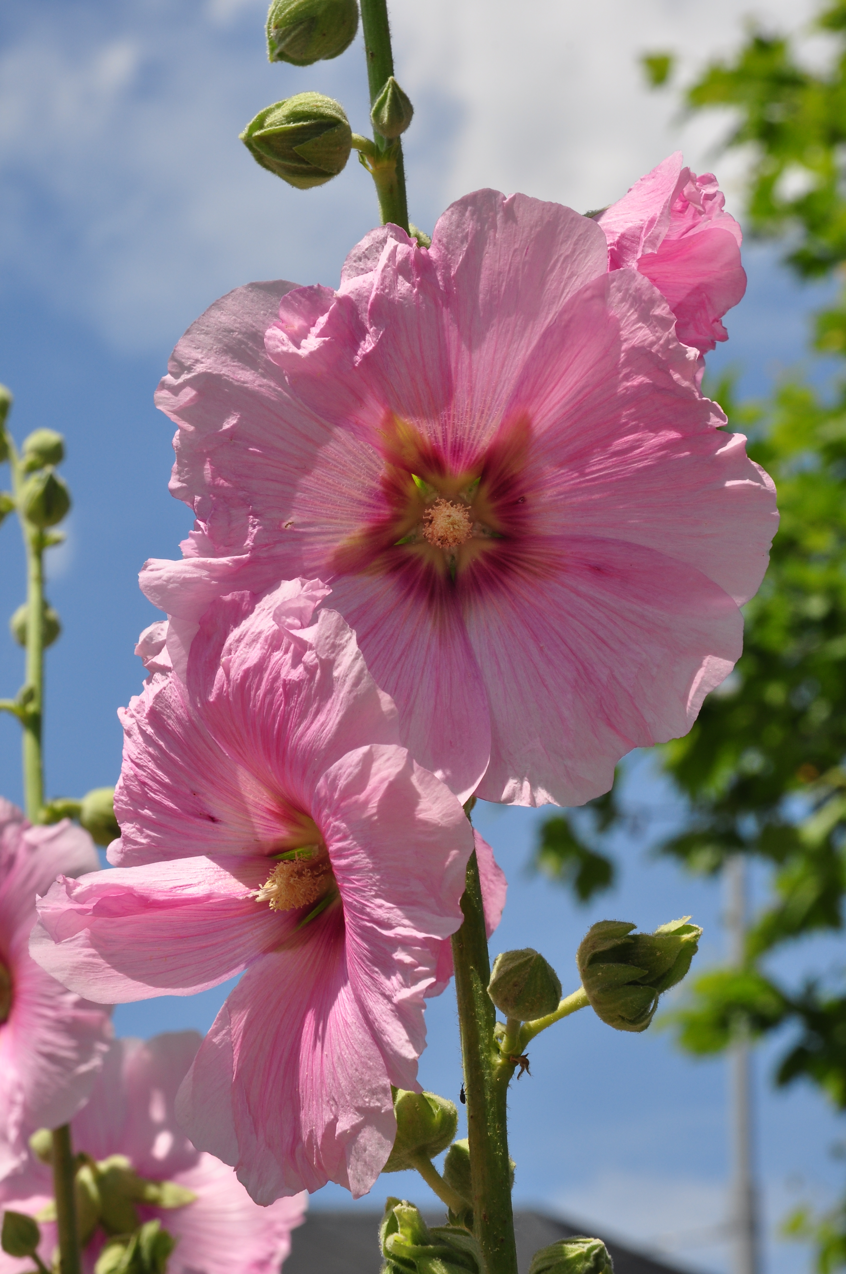 Alcea rosea, Tessinerplatz in Zürich-Enge (Switzerland)